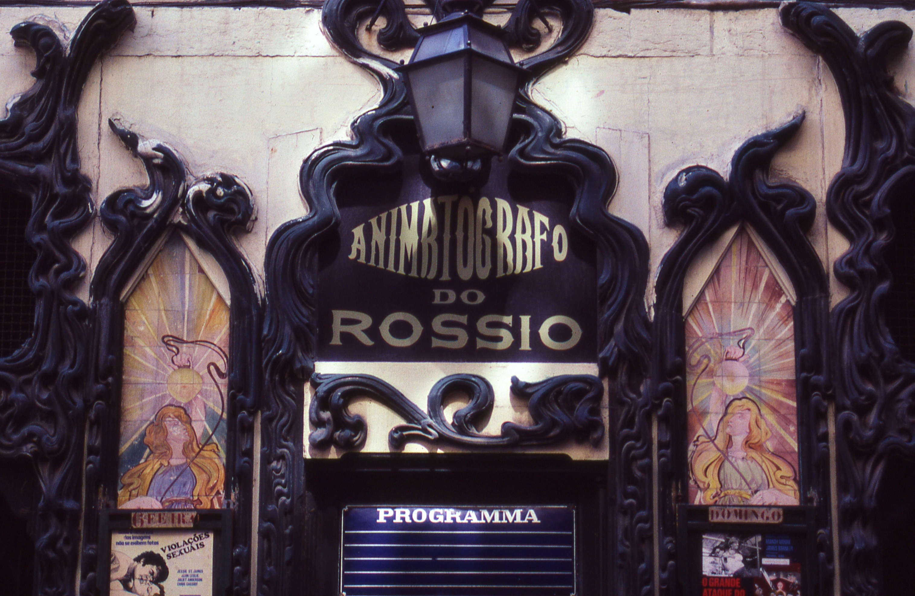 Animatógrafo do Rossio em Lisboa.